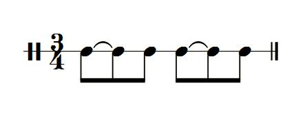 Ritmo della Volta: ballo rinascimentale in voga in Europa nel XVI e XVII sec.